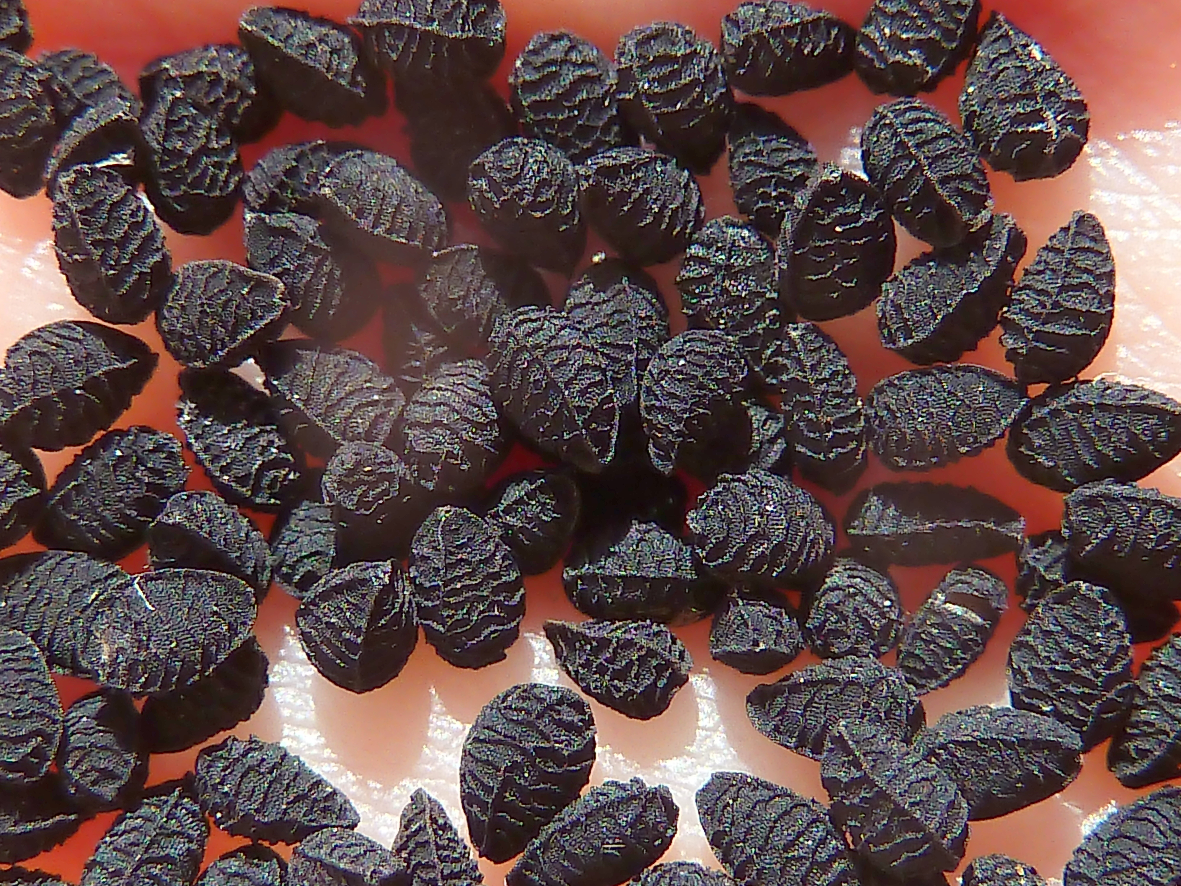 Nigella damascena (arañuela) - Semillas sueltas. - Avda del Dr. Barnard, Águilas, Provincia de Murcia (España).